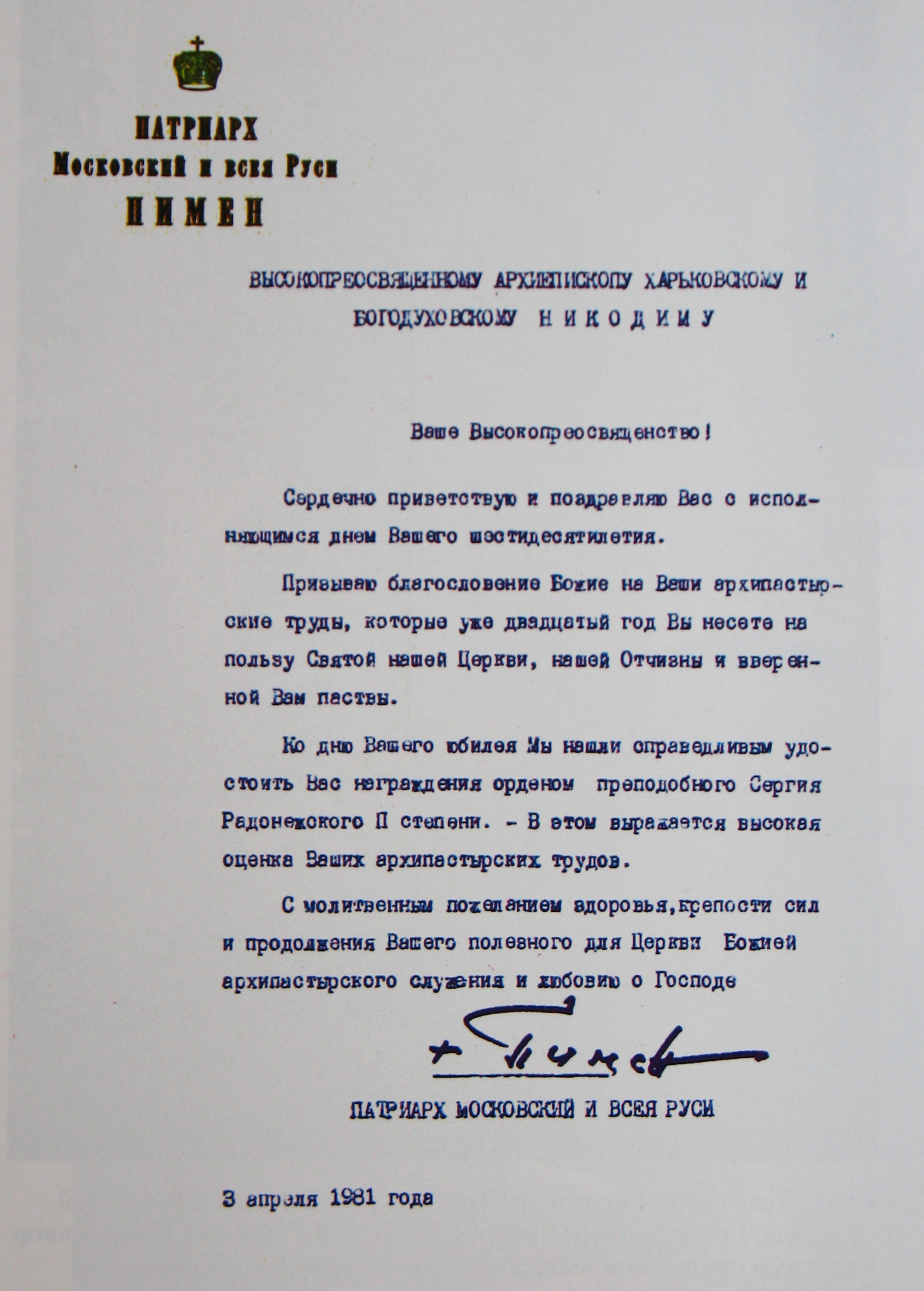 Наградной лист Патриарха Московского и Всея Руси Пимена архиепископу Никодиму Руснаку. Москва, СССР, 1981 год. Печатная машинка с тёмно-синей лентой.